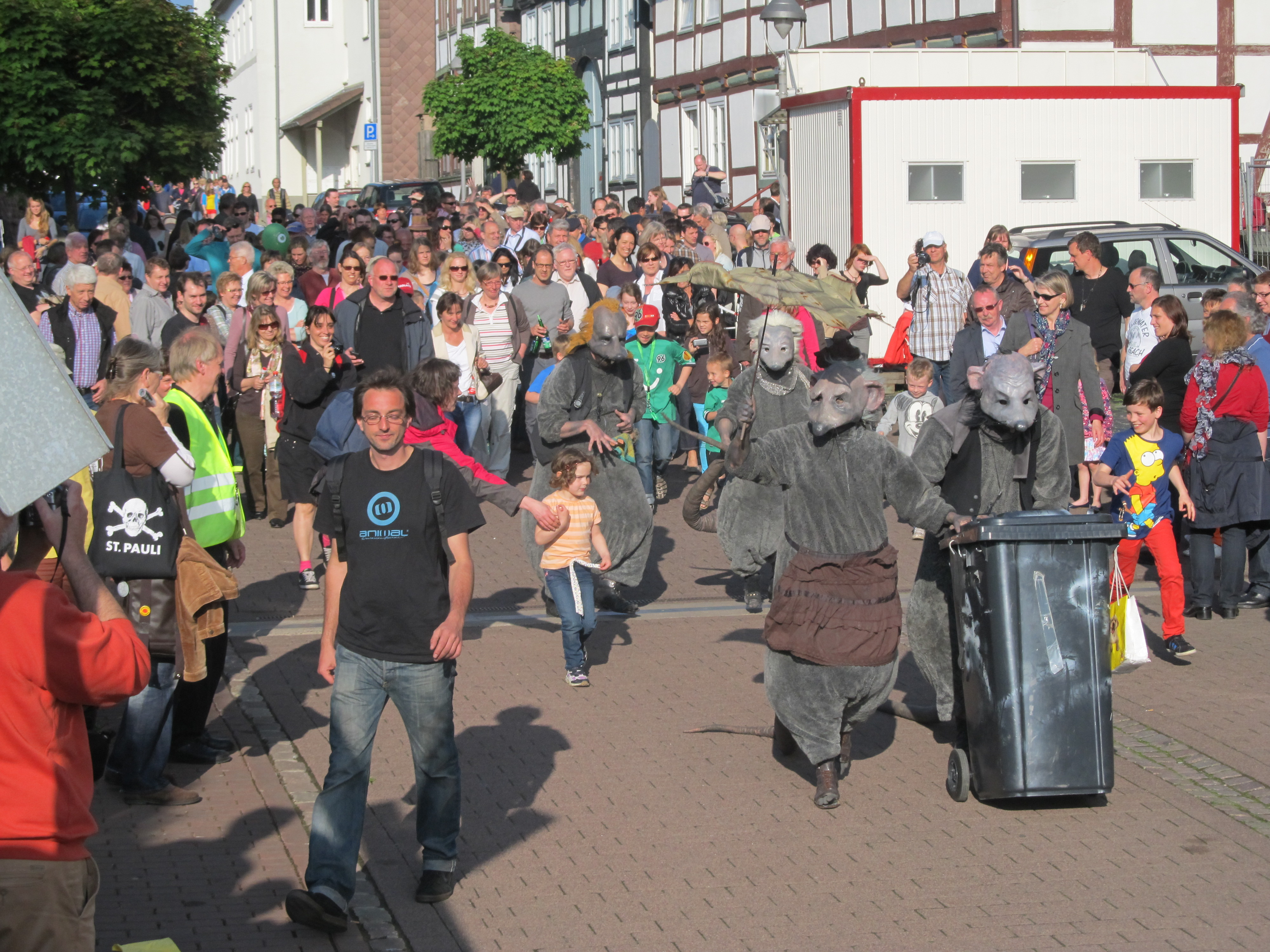 Die Theatergruppe PasParTouT aus Deutschland mit dem Stück "Die Ratten kommen!" beim 12. Internationalen Straßentheterfestival in Holzminden 2013